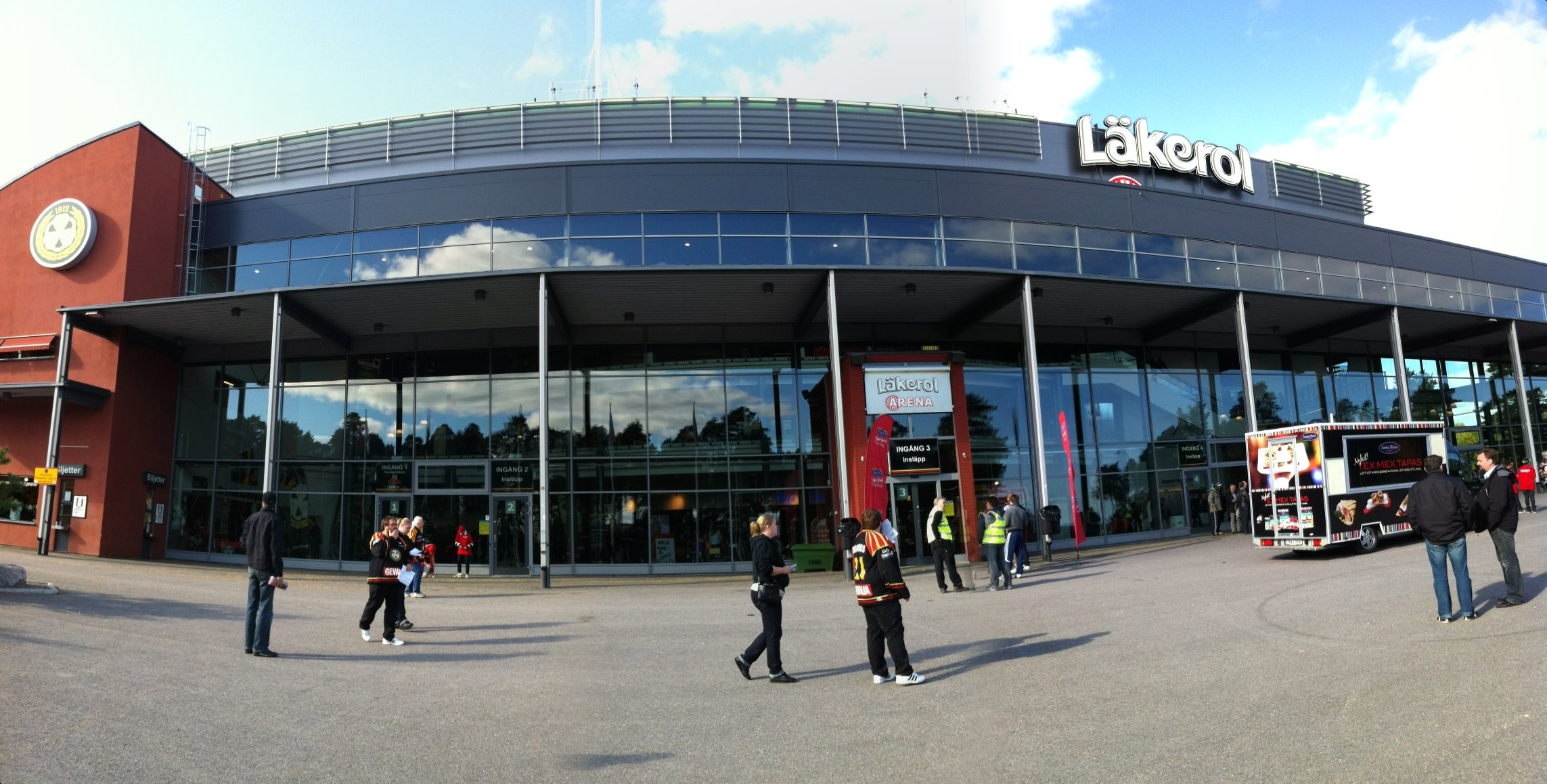 Läkerolen...